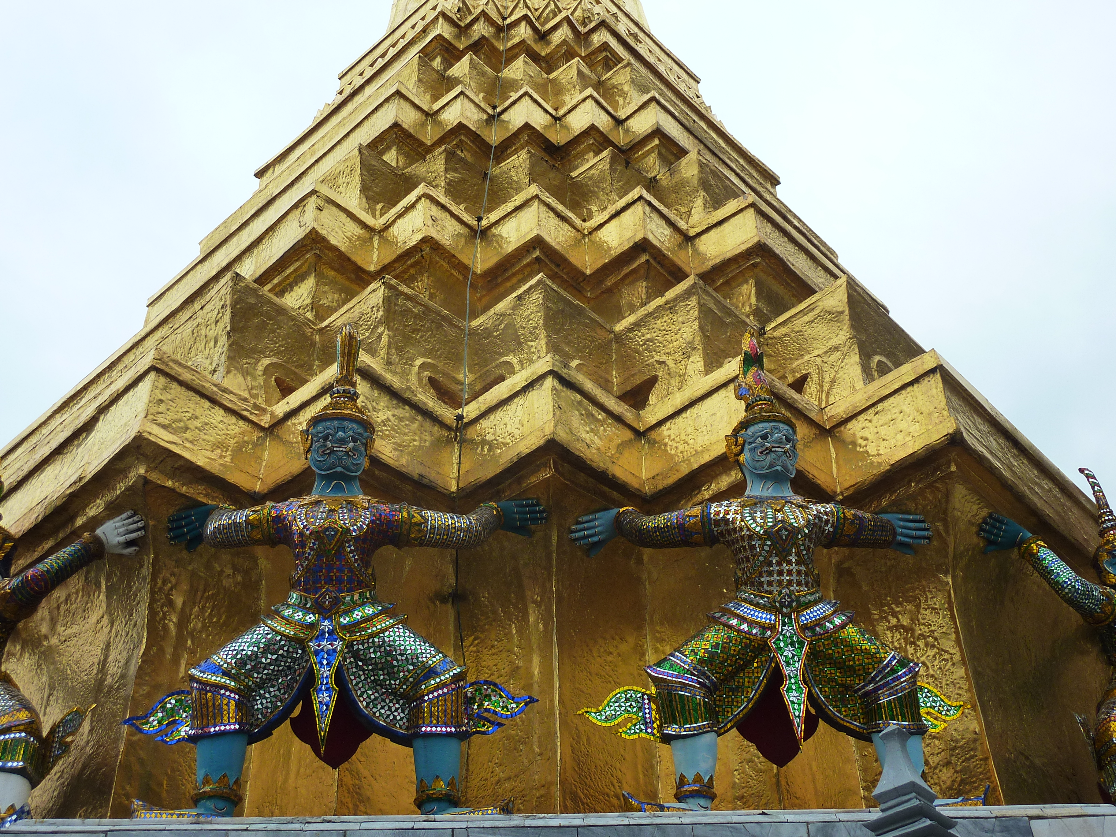 Wat Phra Kaew, Bangkok